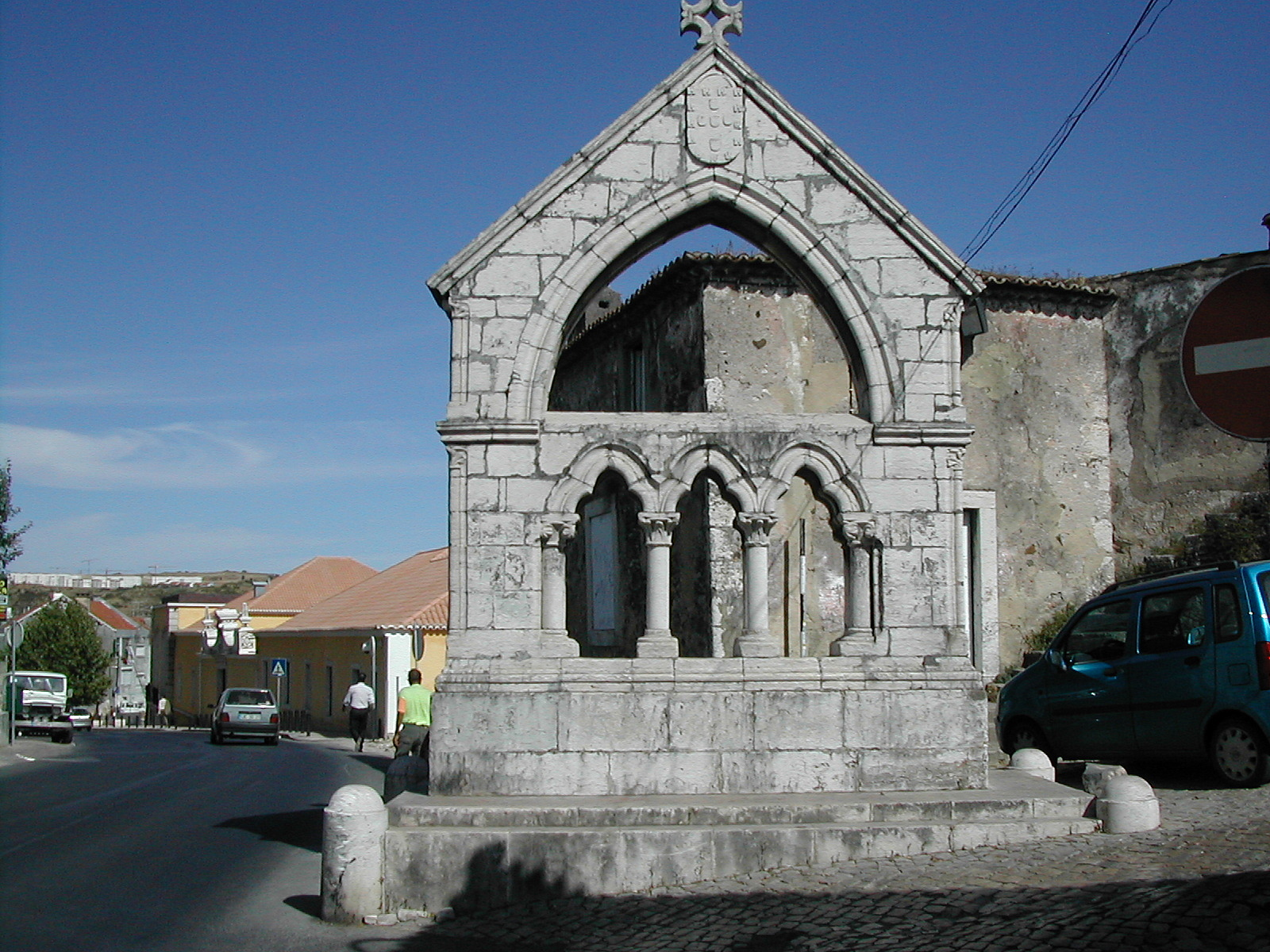 Memorial, Odivelas, Portugal